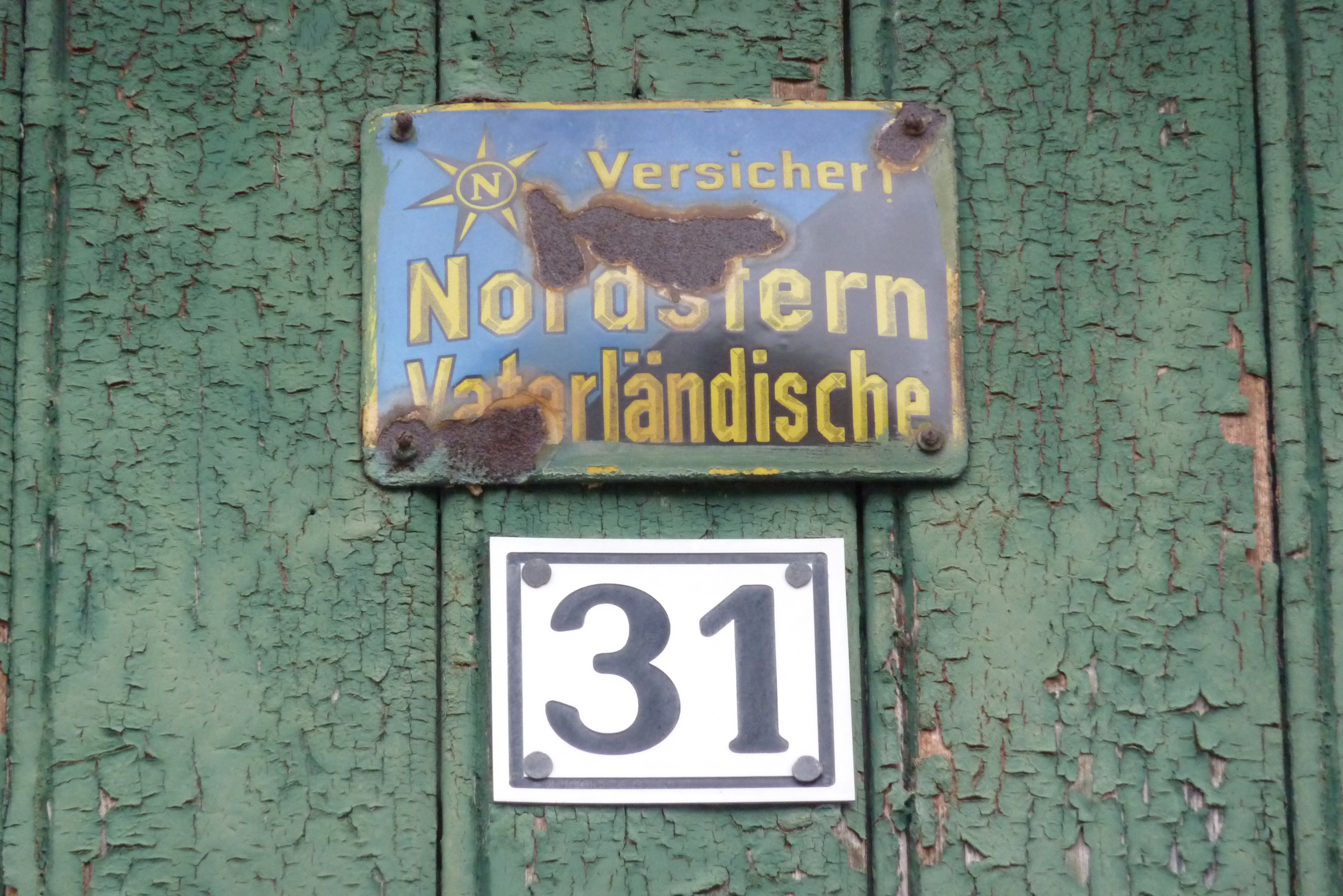 Emailletafel an einem Haus in Niederdrees, Ortsteil von Rheinbach, Aufschrift: "Versichert Nordstern Vaterländische"